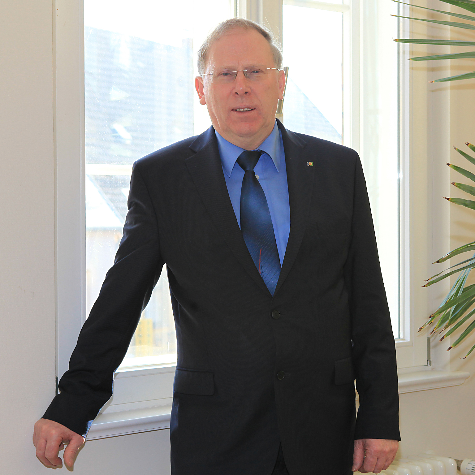 Fotografie von Norbert Reier, seit 2001 Bürgermeister der Stadt Plau am See